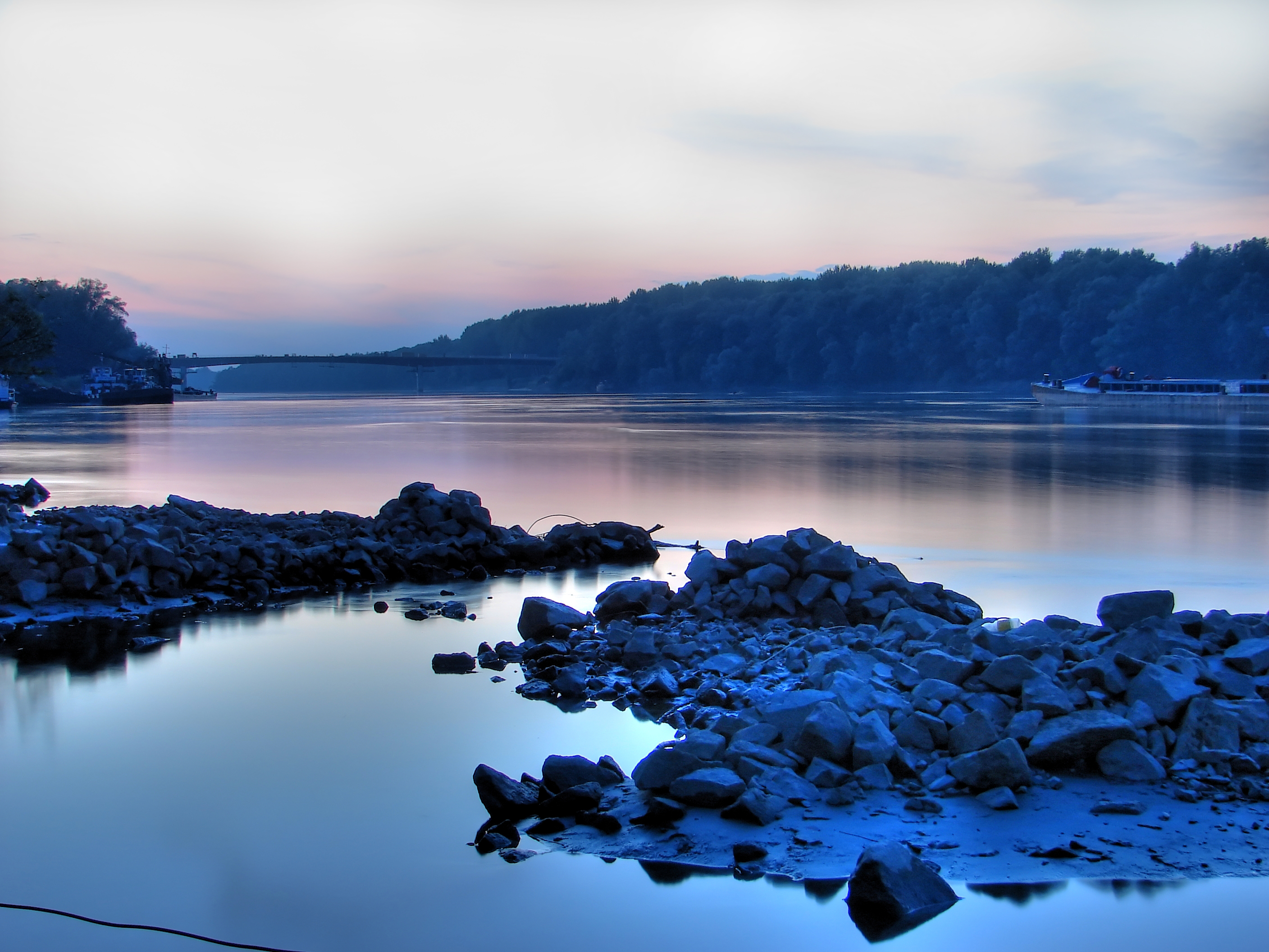 Moja Drava